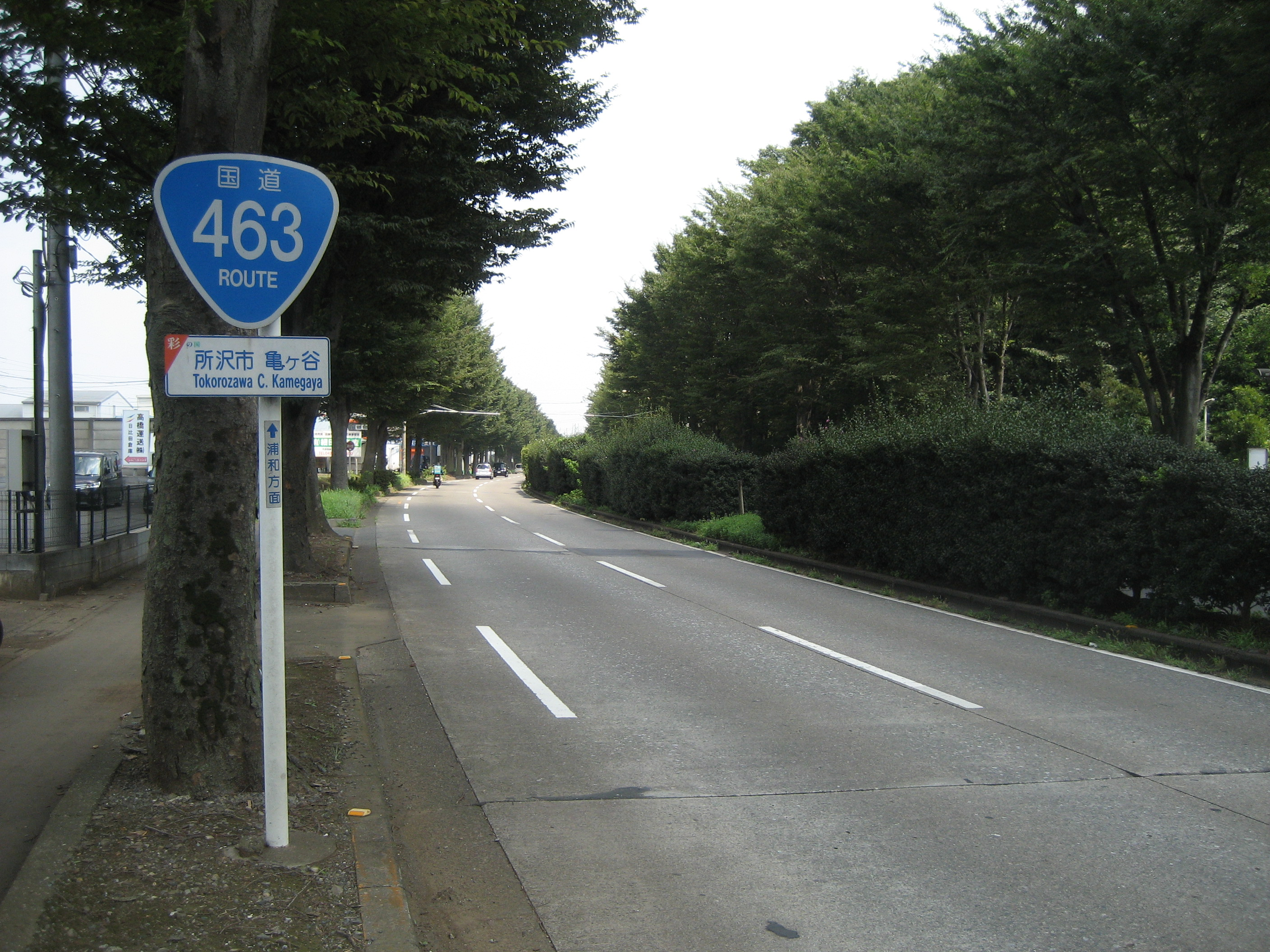 国道463号線浦和所沢バイパス所沢市亀ヶ谷付近（さいたま方面を撮影）